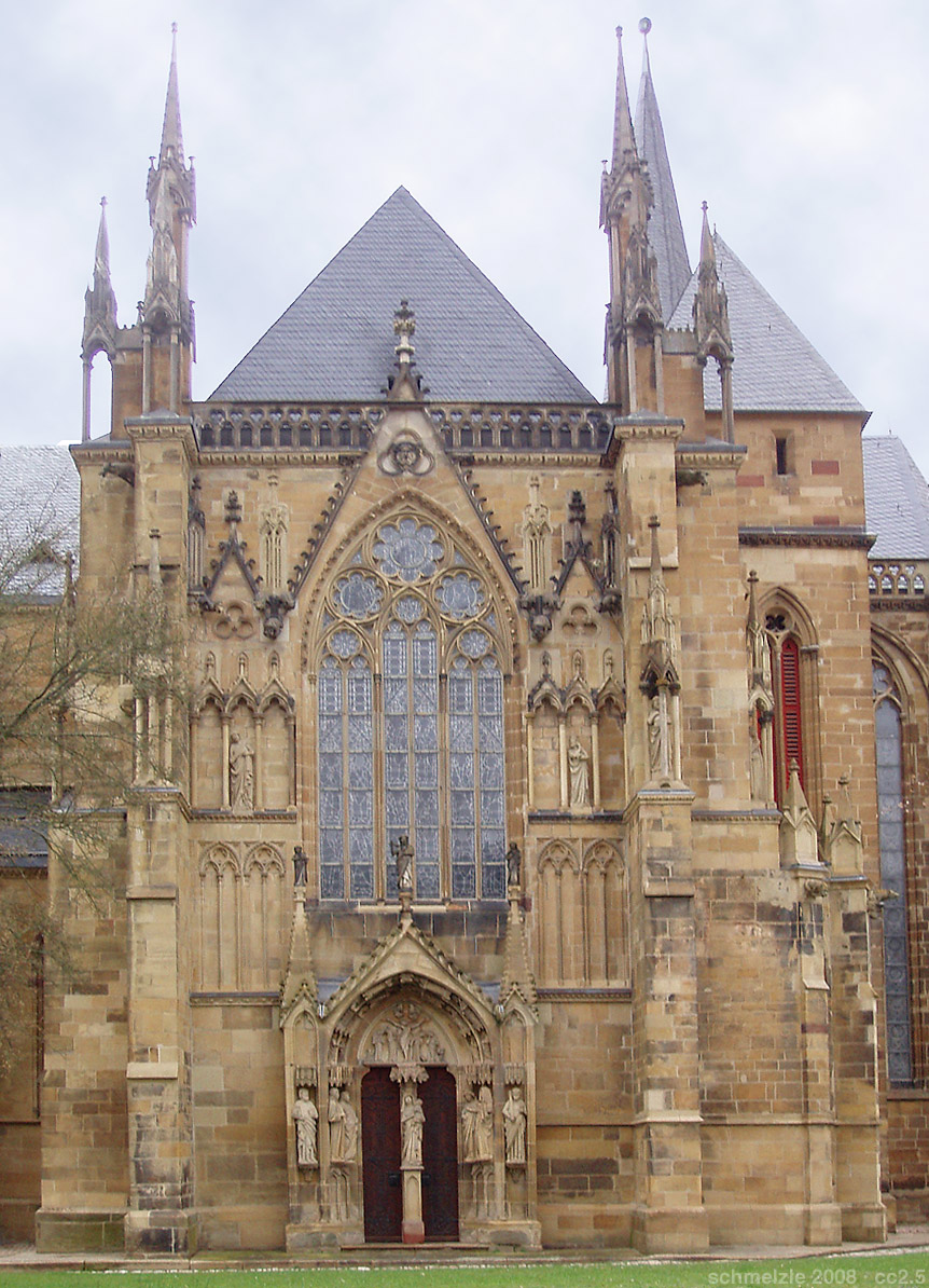 Stiftskirche St. Peter, Bad Wimpfen, Südgiebel des Querhauses